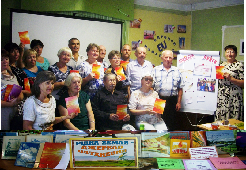 Прем'єра колективної поетичної збірки "Променисті рядки" літературного об'єднання "Промінь" (місто Подільськ, Одеська область, центральна бібліотека Куяльницької ЦБС)